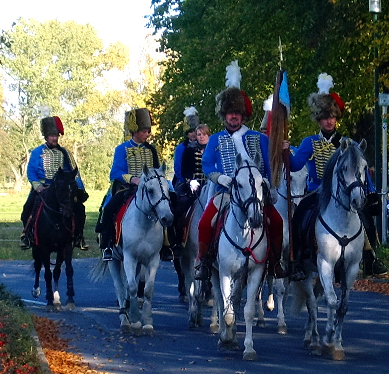 Husaren in Elsterwerda anlässlich des 250-jährigen Jubiläums des Berliner Husarenstreiches von Graf Hadik am 11. Oktober 2007